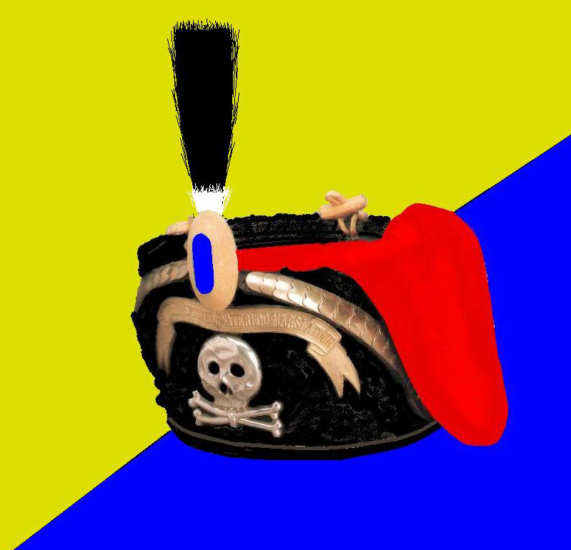 Mütze des Husarenregiment 17 (Parade)